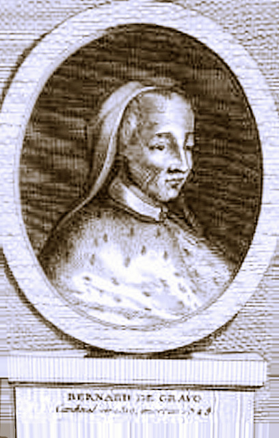 Cardinal Bernard de Garves